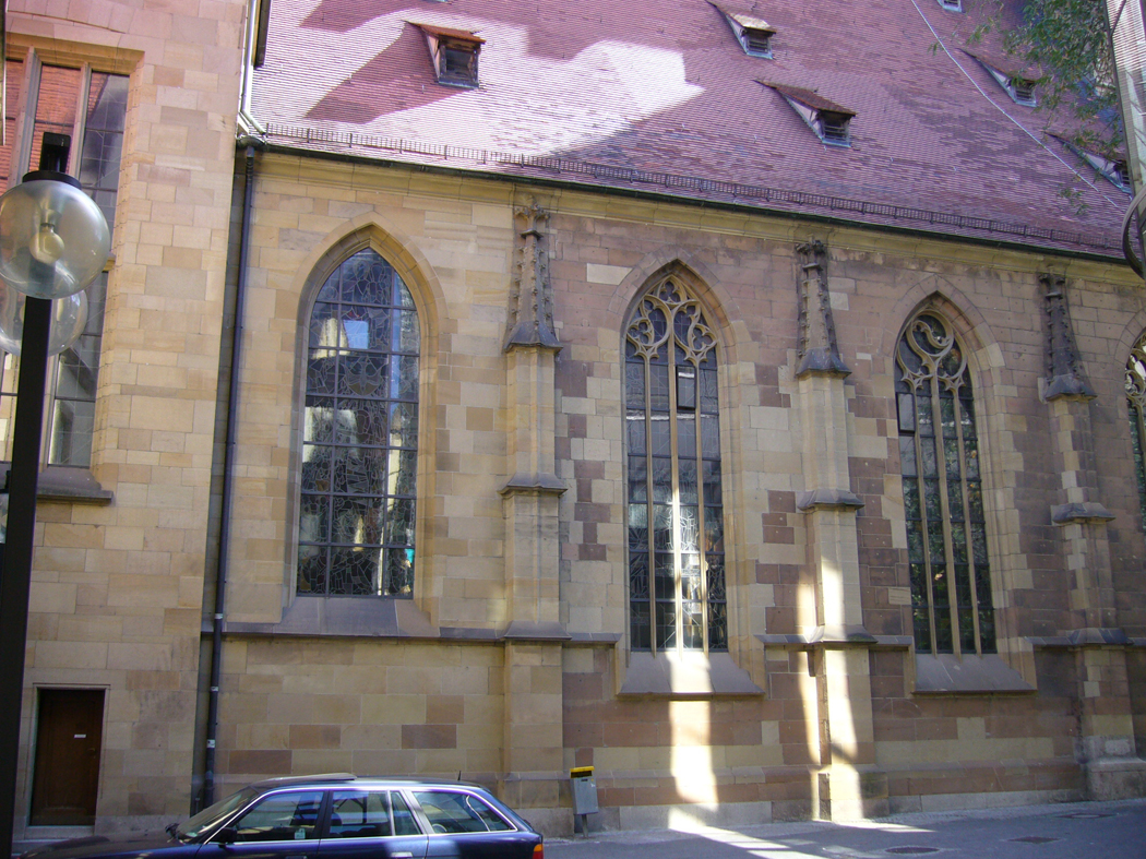 Stiftskirche Stuttgart, Die Nordseite des Langhauses